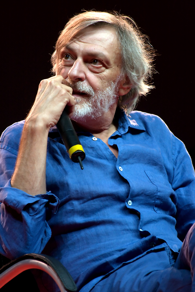 Gino Strada, 10 Settembre 2010, Mandela Forum, 9° Incontro nazionale di Emergency, Firenze